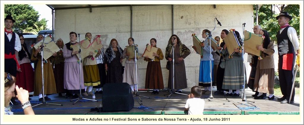 Actuação no I Festival "Sons e Sabores" na Ajuda, Lisboa